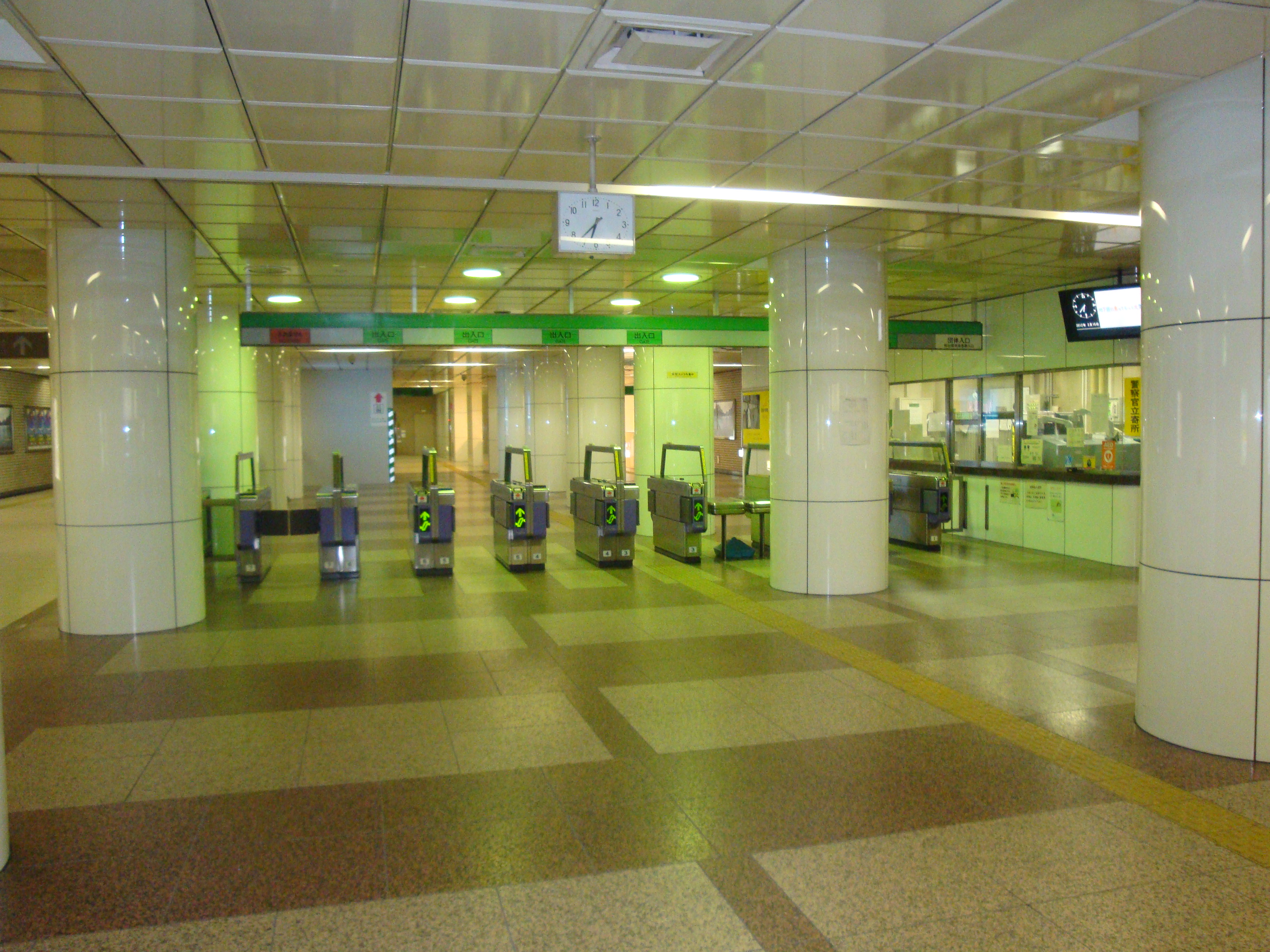 地下鉄仙台駅・南改札